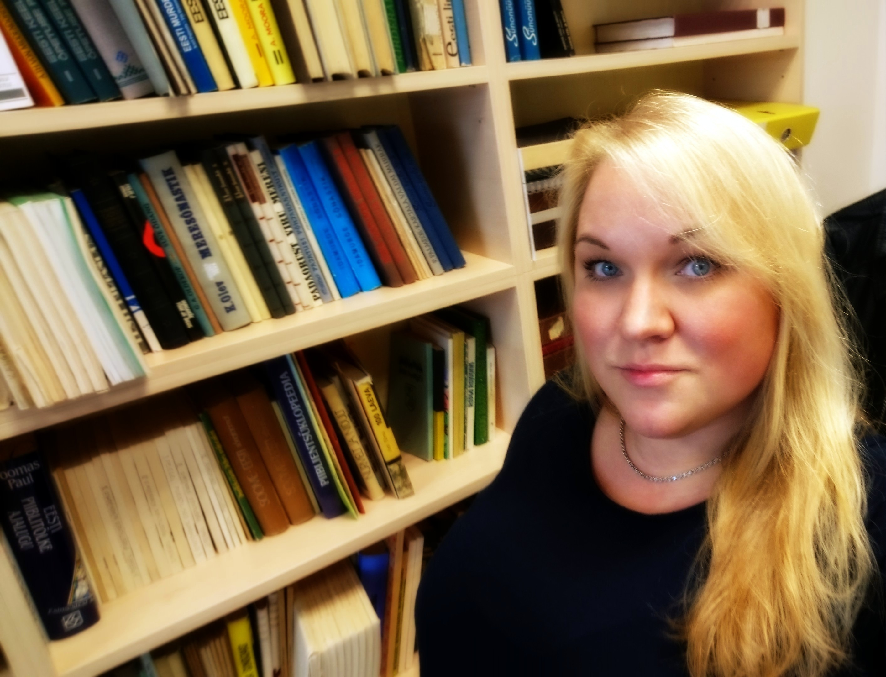 Tiina Laansalu